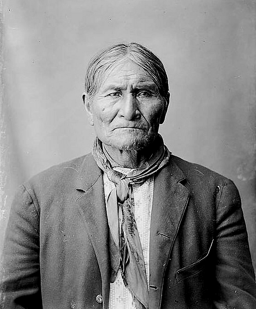 Portret van Goyathlay, beter bekend als Geronimo, leider der Apachen, ca. 1887. Fotograaf: Vermoedelijk Frank Rinehart (1862-1928).